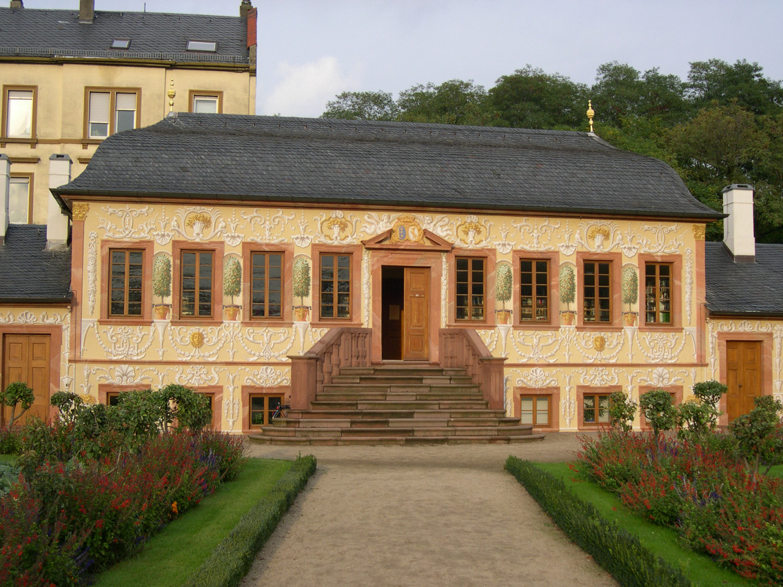 Prinz-Georg-Palais am Herrngarten, Darmstadt